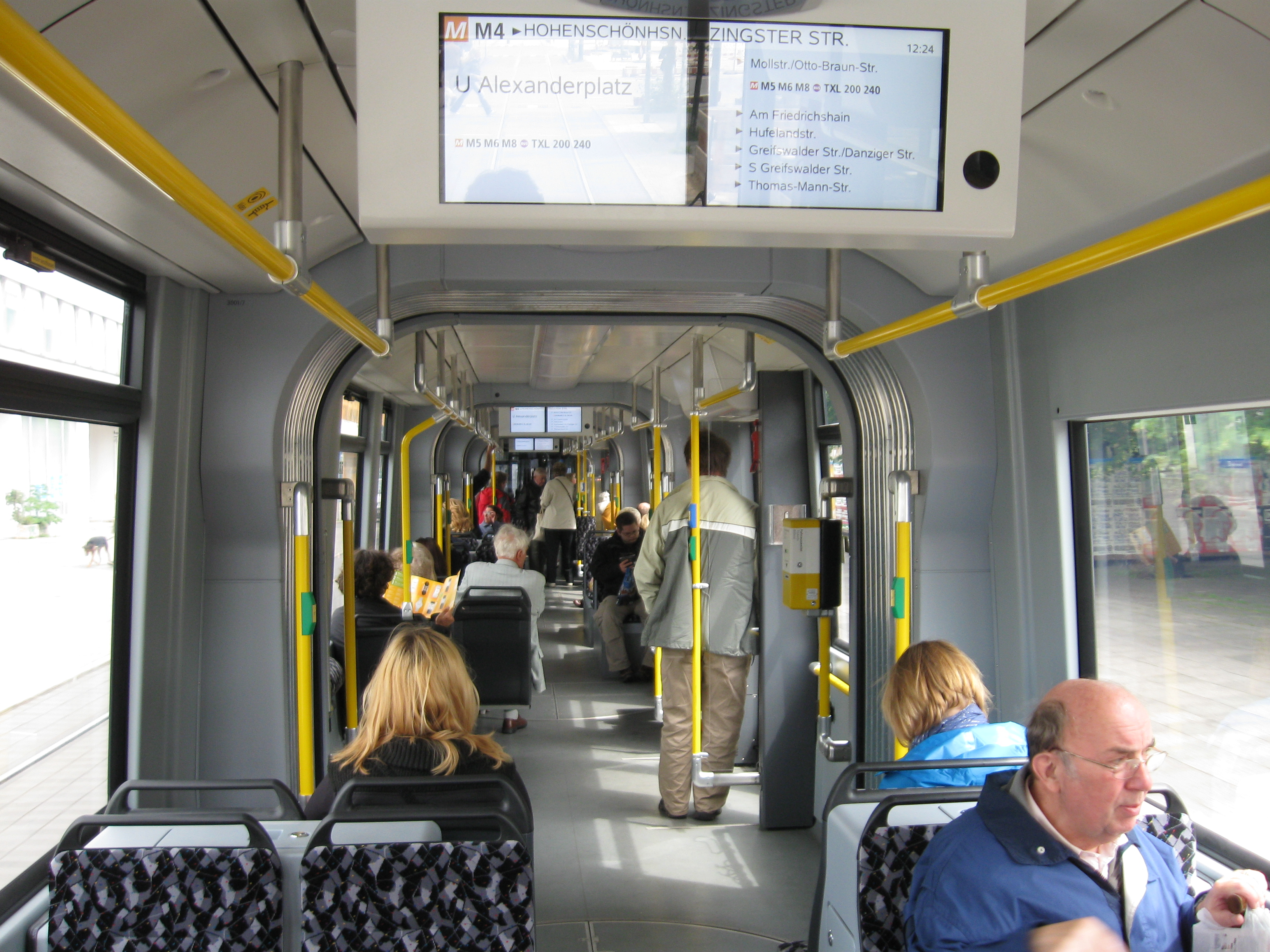 Bombardier Flexity Berlin, Innenansicht